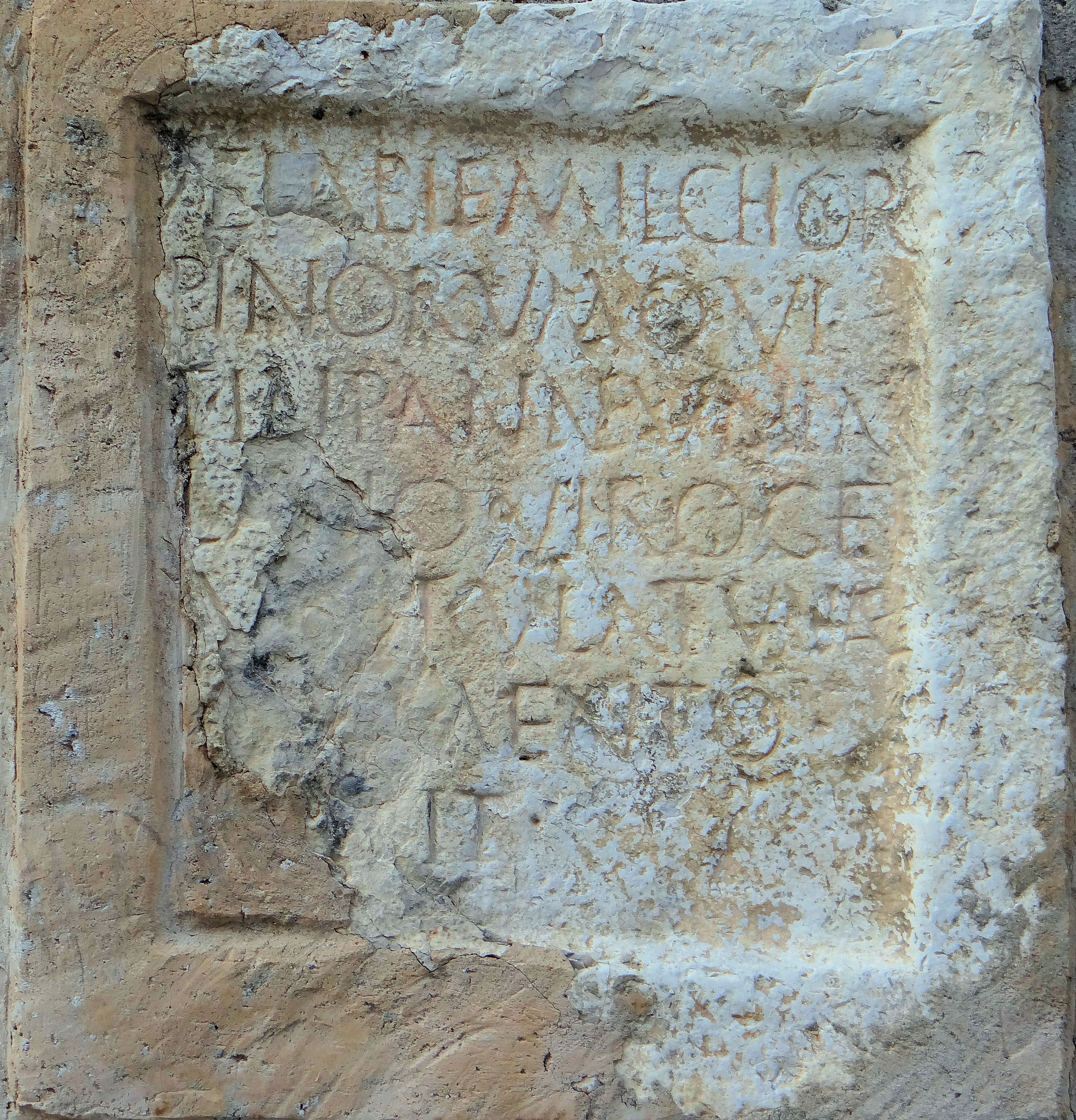 Le Broc - Église Sainte-Marie-Madeleine - Inscription romaine